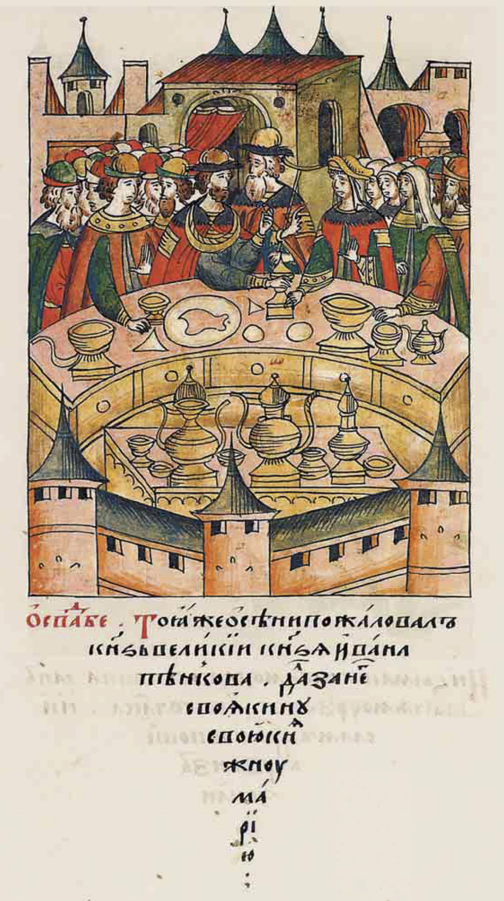 О свадьбе. Той же осенью великий князь пожаловал князя Ивана Пенкова, дал за него свояченицу свою княжну Марью.